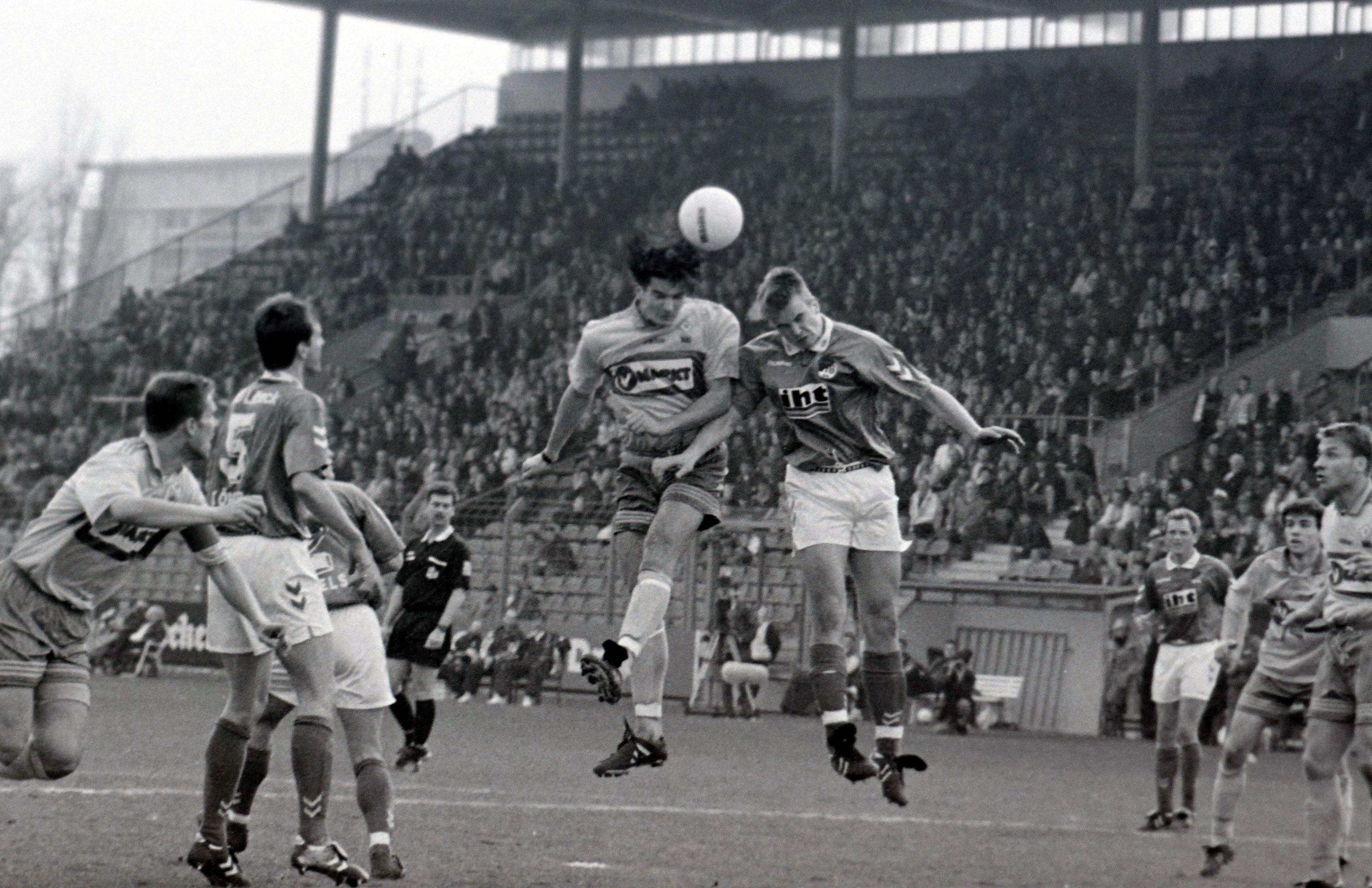 28.März 1998 - Eintracht Braunschweig gegen VfB Lübeck 2:1. Regionalliga Nord 97/98 - Kopfball 16. Minute zum 1:0 - Leo Maric (links) im Kopfballduell mit Sven Tramm / Foto David Taylor - Braunschweig